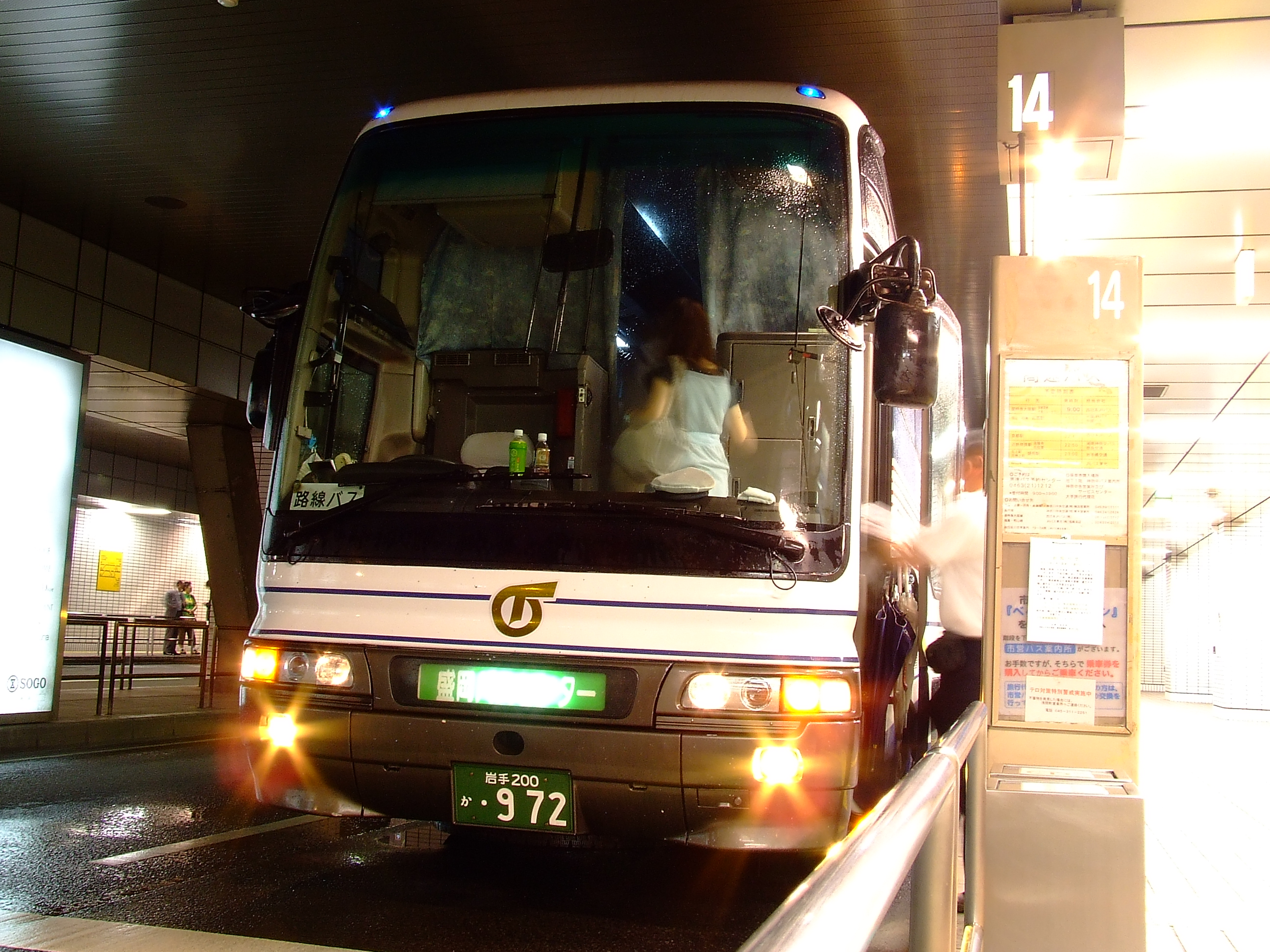 岩手県交通の高速バス盛岡～横浜線 横浜駅東口にて